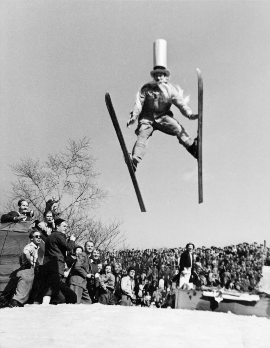 Ola Narr hoppbakke i Oslo